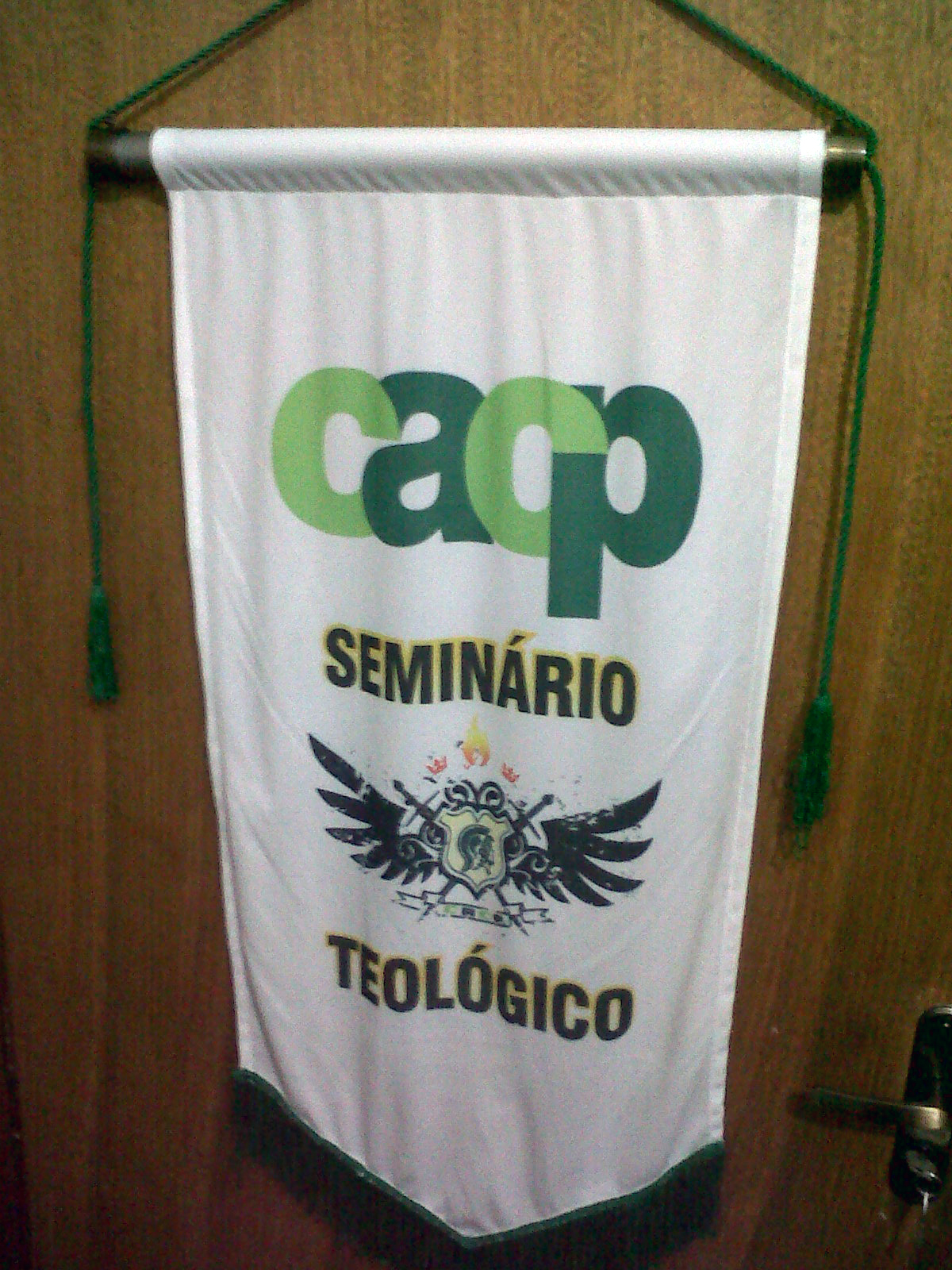 Brasão do Seminário Teológico CACP.